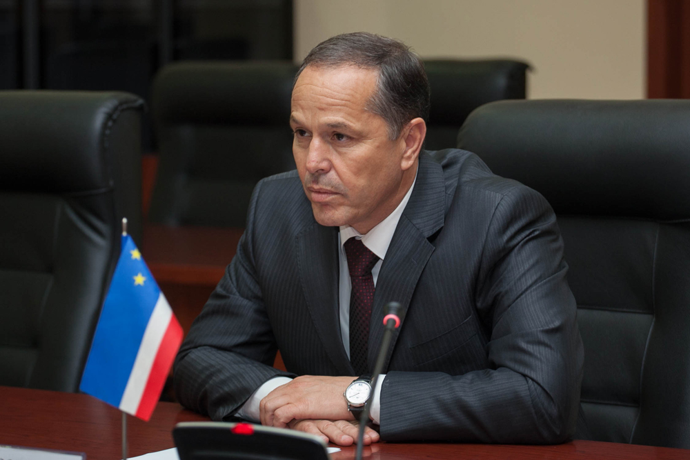 Михаил Макарович Формузал - 7-й Башкан Гагаузии